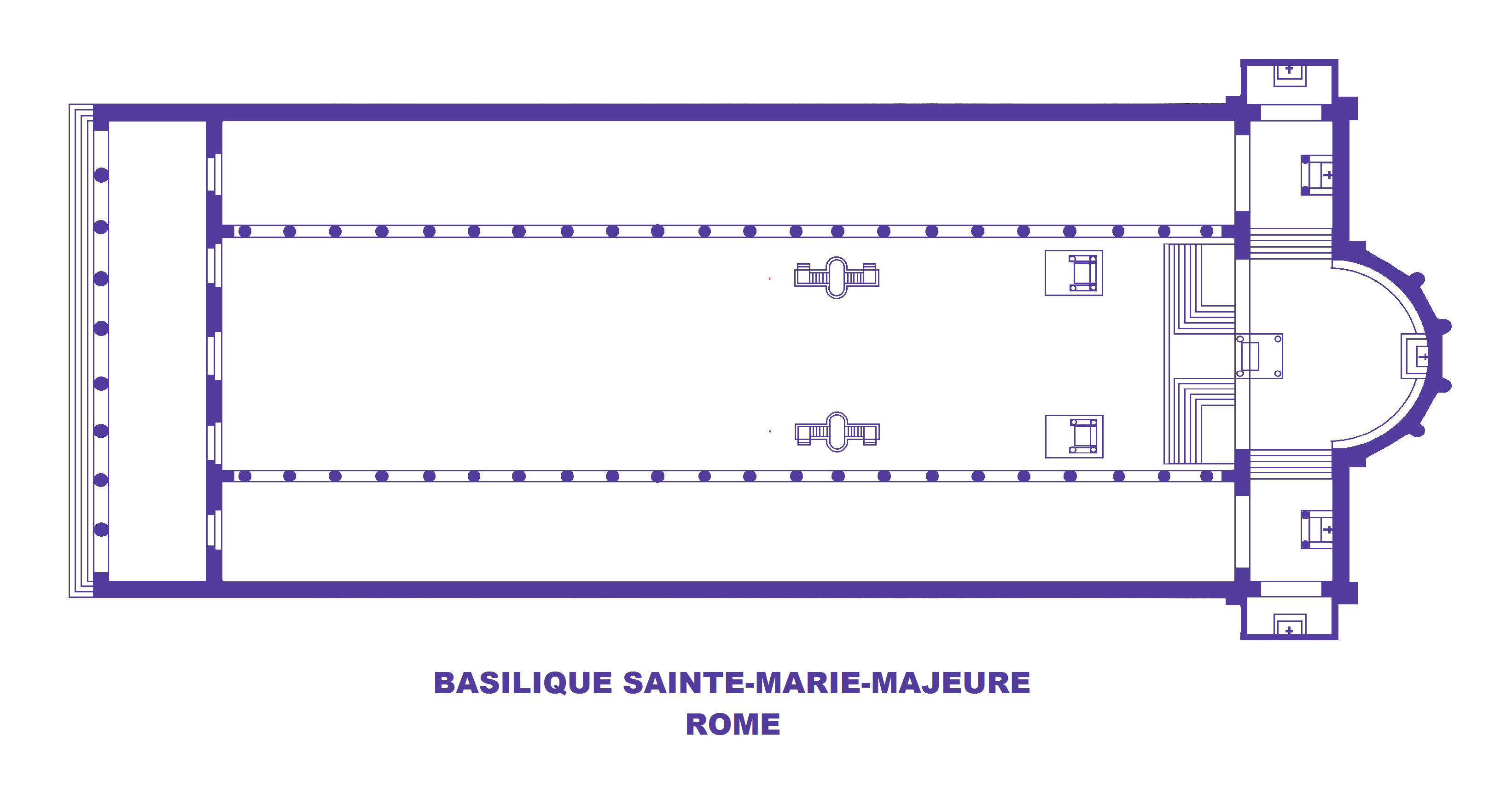 Basilique Sainte-Marie-Majeure - Rome, Plan